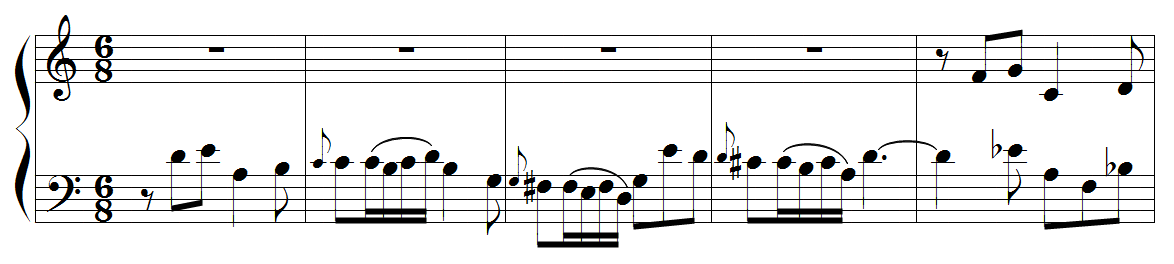 Anton Reicha - sujet de la fugue n°35 des 36 fugues, op.36